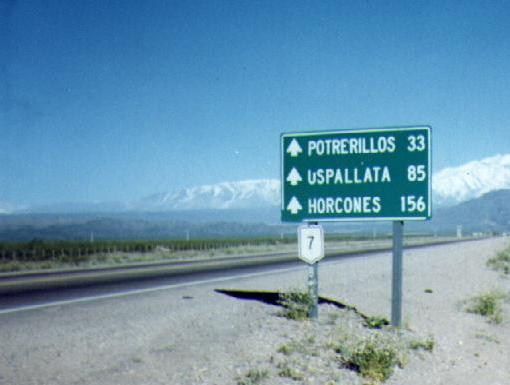 A road (Ruta Nacional 7) in Mendoza/Argentina